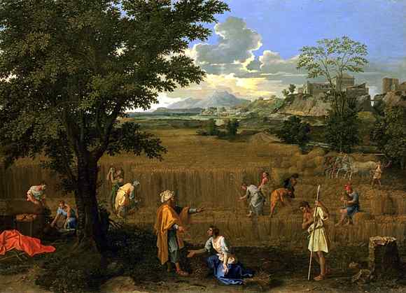 Landscape